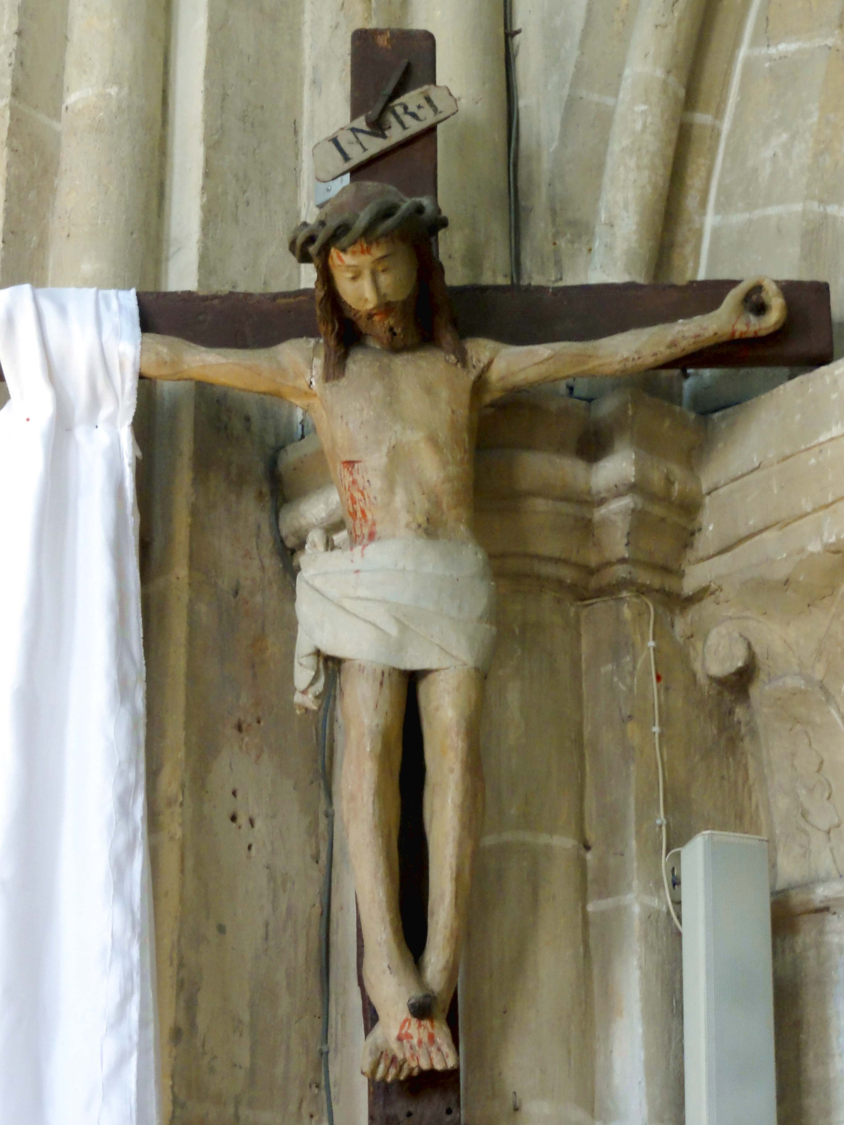 Christ en croix.